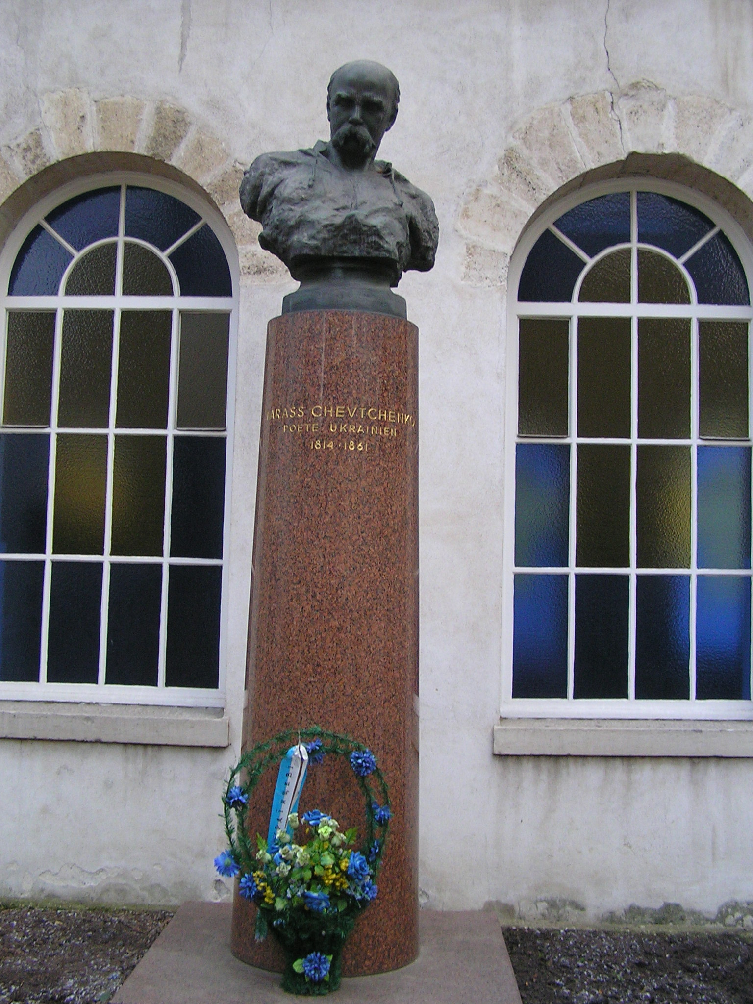 monument présent au square Tarass Chevtchenko dans le 6e arrondissement à Paris.